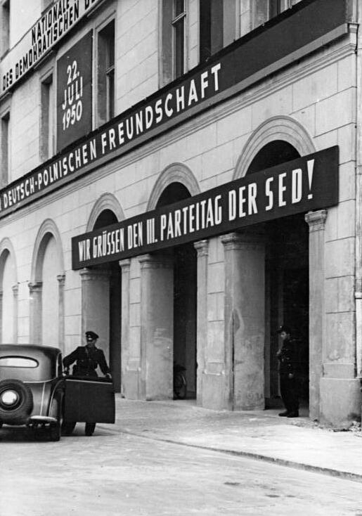 Berlin, Thälmann-Platz, "Haus der Nationalen Front", geschmückt Zum III.Parteitag der SED vom 20.bis 24.Juli 1950 sind die Straßen im Demokratischen Sektor Berlins mit Losungen, Transparenten und Fahnen feierlich geschmückt. UBz: "Haus der Nationalen Front" am Thälmann-Platz Aufn.: Illus kemlein 18.7.50